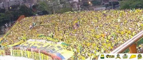 LBDL